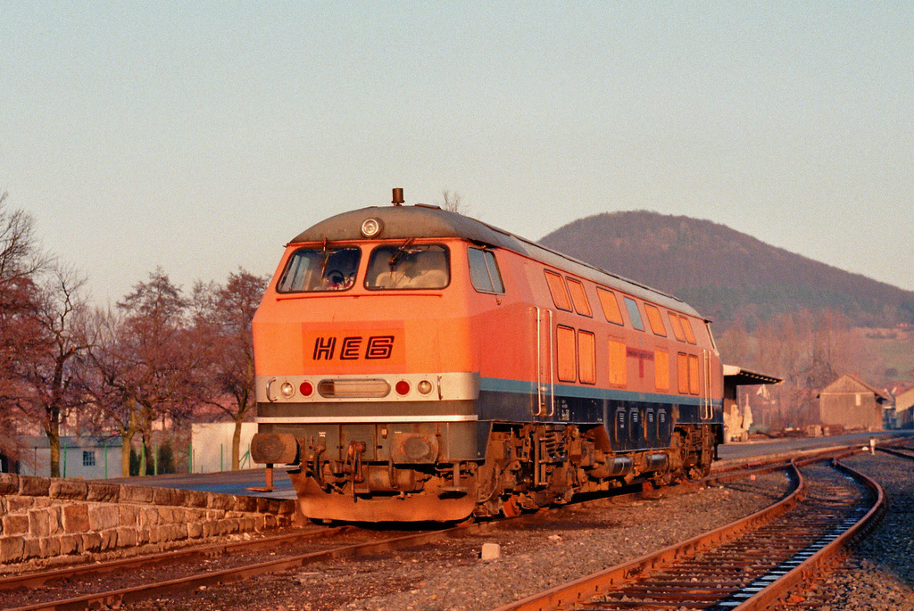 V 30 der Hersfelder Eisenbahn im November 1988 in Schenklengsfeld